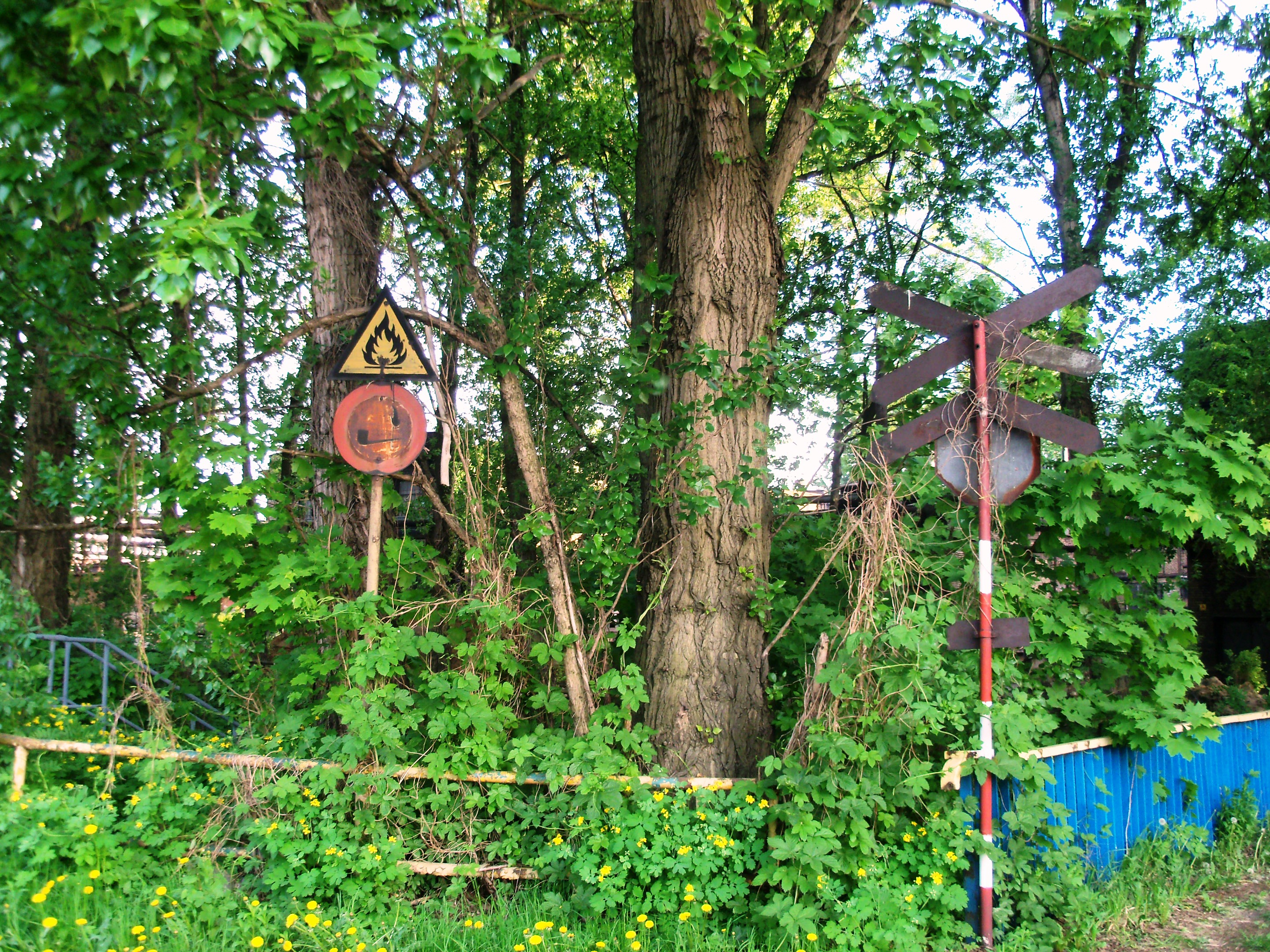 Huta Baildon w Katowicach